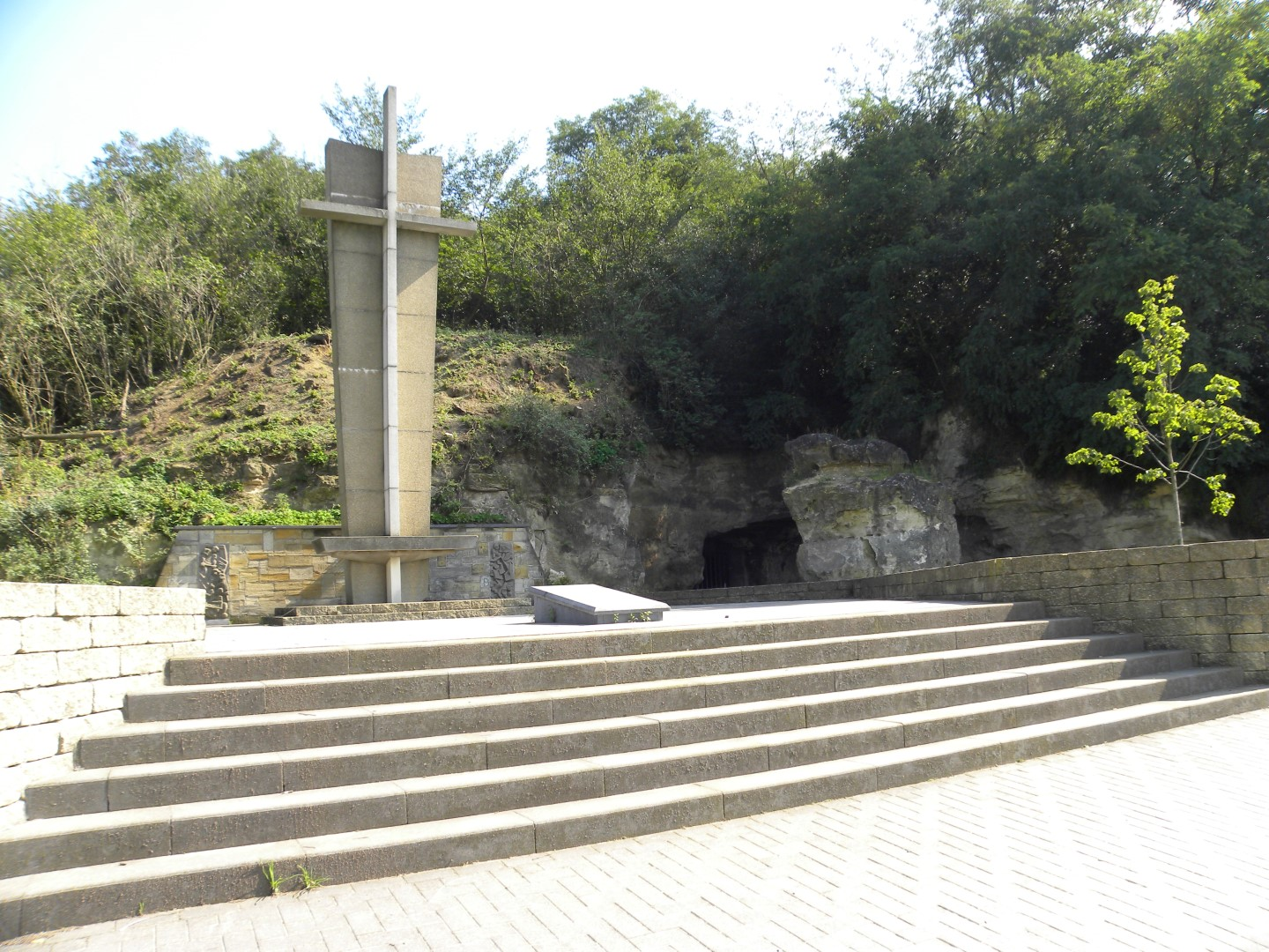 Zichen-Zussen-Bolder, Mennestraat, monument voor de slachtoffers van de ramp van de Roosburg, instorting van mergelgrot